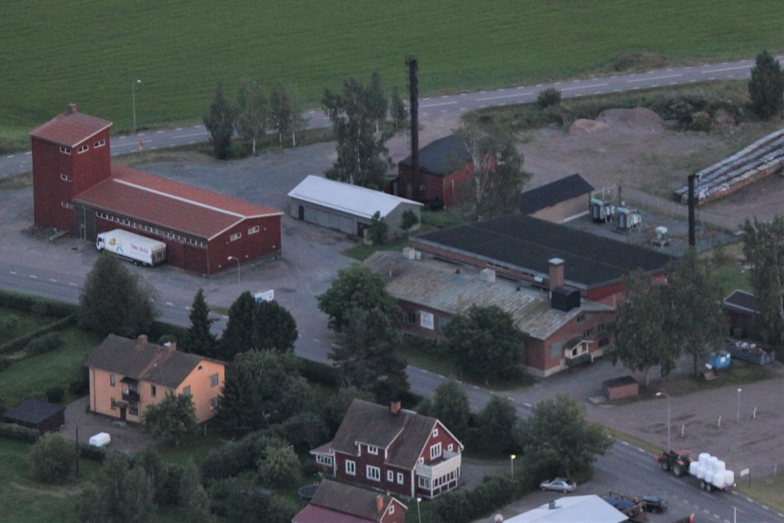 Flygfoto över Stora Skedvi, Säters kommun, Dalarnas län, Sverige. Före detta mejeriet i Landa, vid fototillfället Vika Bröd, numera Skedvi Bröds bageri. This aerial photograph has been approved for publishing by the Swedish Armed Forces with the ID: FMTM 10 830:11043 This tag does not indicate the copyright status of the attached work. A normal copyright tag is still required. See Commons:Licensing.